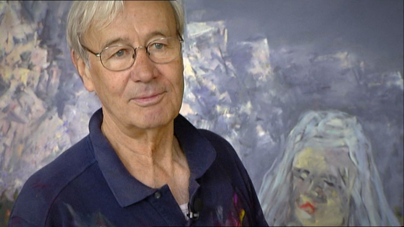 Dieses Bild ist ein Standbild aus dem Bericht über Max Kaminski aus der Reihe "Kunstraum" von ARD-alpha, deren Erlaubnis ich zur Veröffentlichung habe.